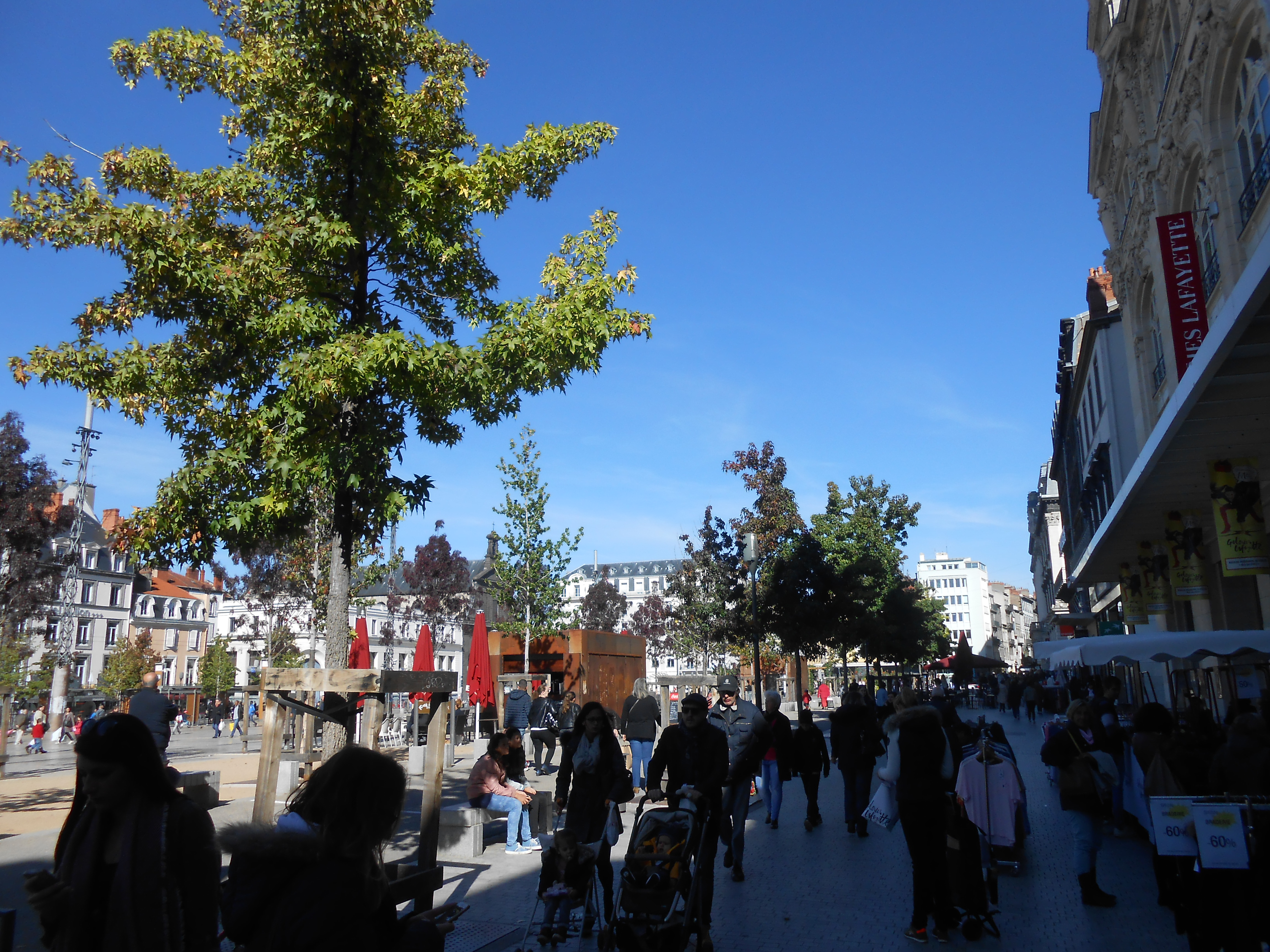 Une des allées piétonnes de la place de Jaude, à Clermont-Ferrand, Auvergne.